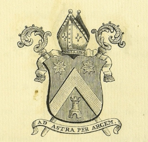 Sint-Michiels abdij Abt/ Verzameling der graf- en gedenkschriften van de provincie Antwerpen. - Antwerpen, 1856 - 1903/ Erfgoedbibliotheek Hendrik Conscience (Antwerpen)